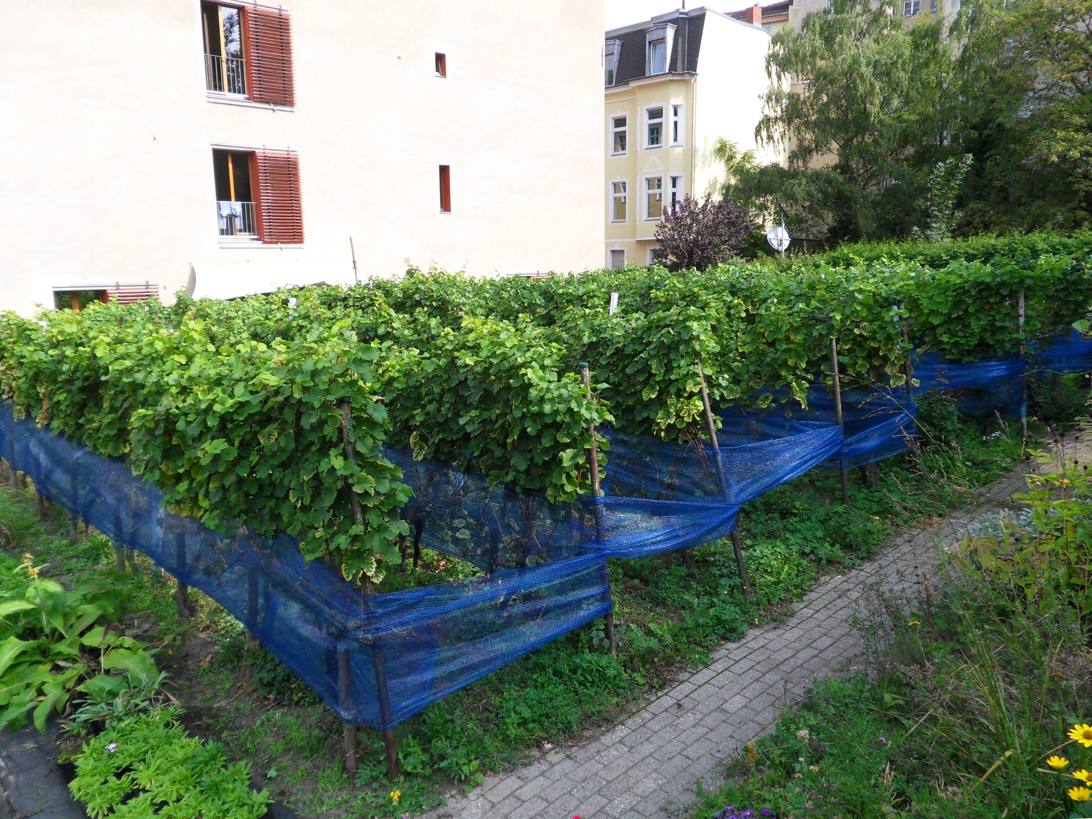 In Berlin am Nordhang des Kreuzberges liegt in der Gärtnerei am Viktoriapark, nach Norden geschützt durch die Brandmauer eines Wohnblocks der Methfesselstraße, ein Weinberg mit etwa 300 Rebstöcken. Die geernteten Trauben ergeben den Kreuzberger Wein.